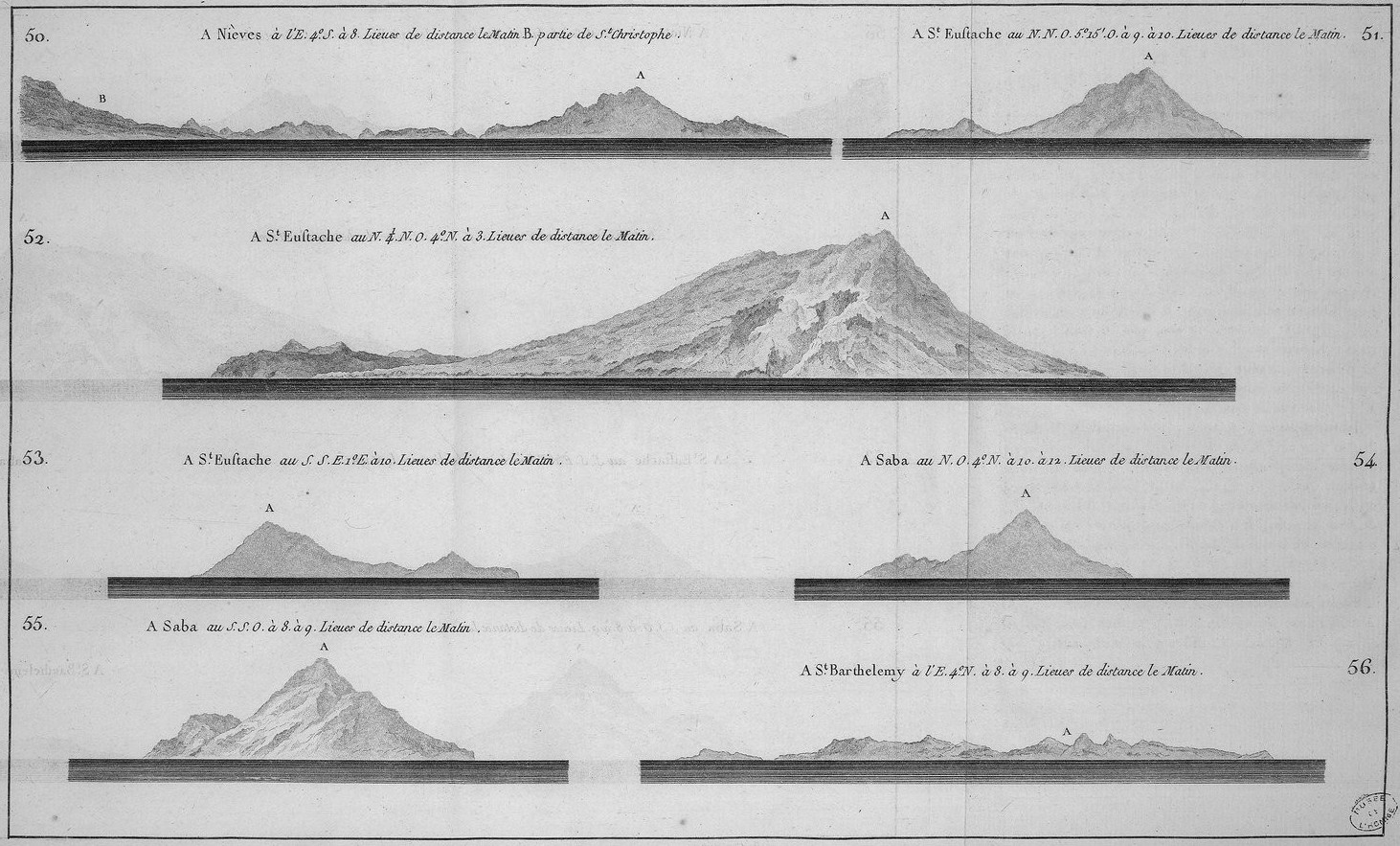 Plan coupe de diverses îles des Antilles réalisé lors de l'expédition de Verdun de la Crenne en 1771-1772. Dessin de Pierre Ozanne, membre de l'expédition, mais référencé sous le nom de son frère, Nicolas Ozanne. Document extrait des Illustrations de Voyage fait par ordre du roi en 1771 et 1772 en diverses parties de l'Europe.